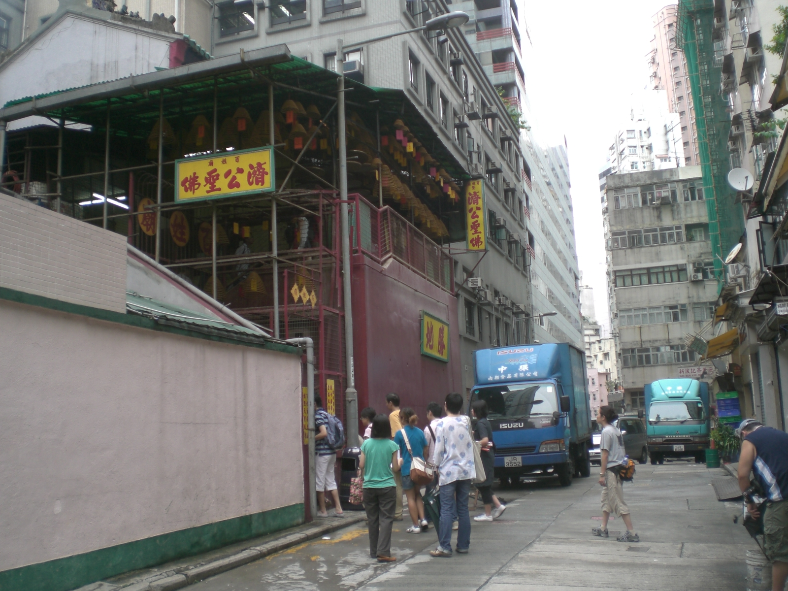 廣福義祠, Sheung Wan, 上環